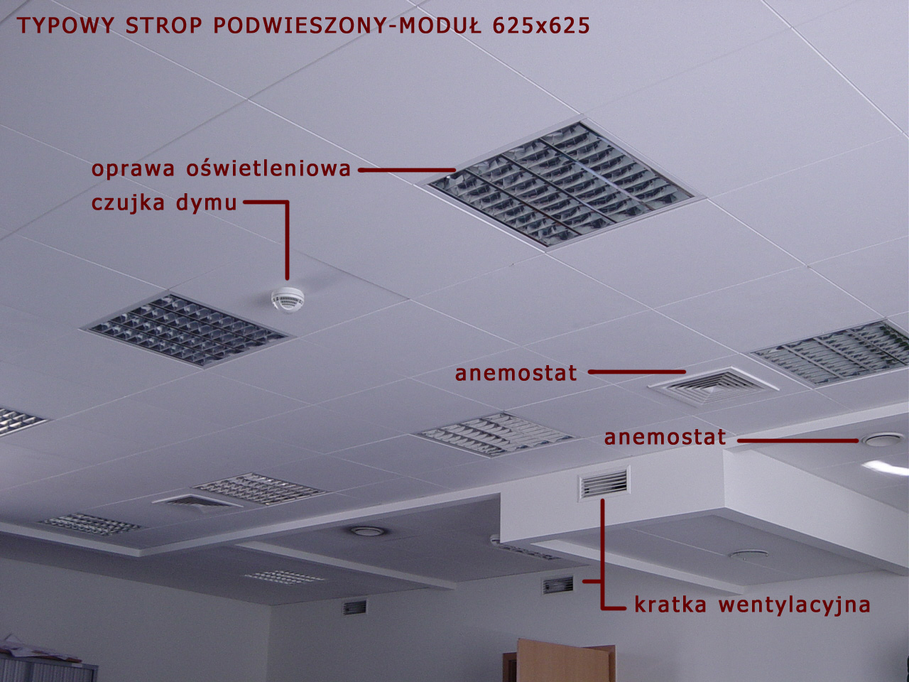 elementy stropu podwieszonego